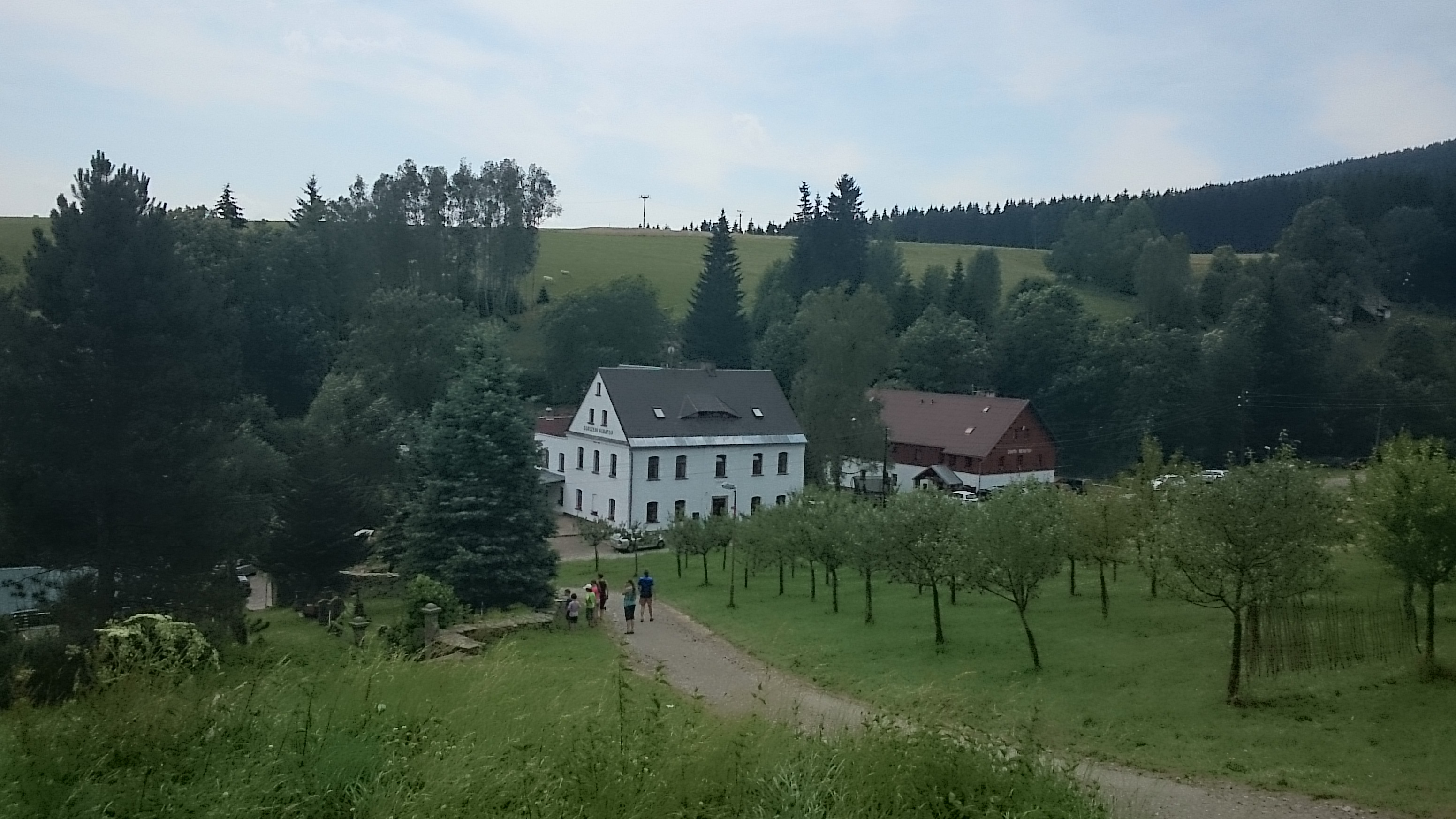 Modell der Kirche